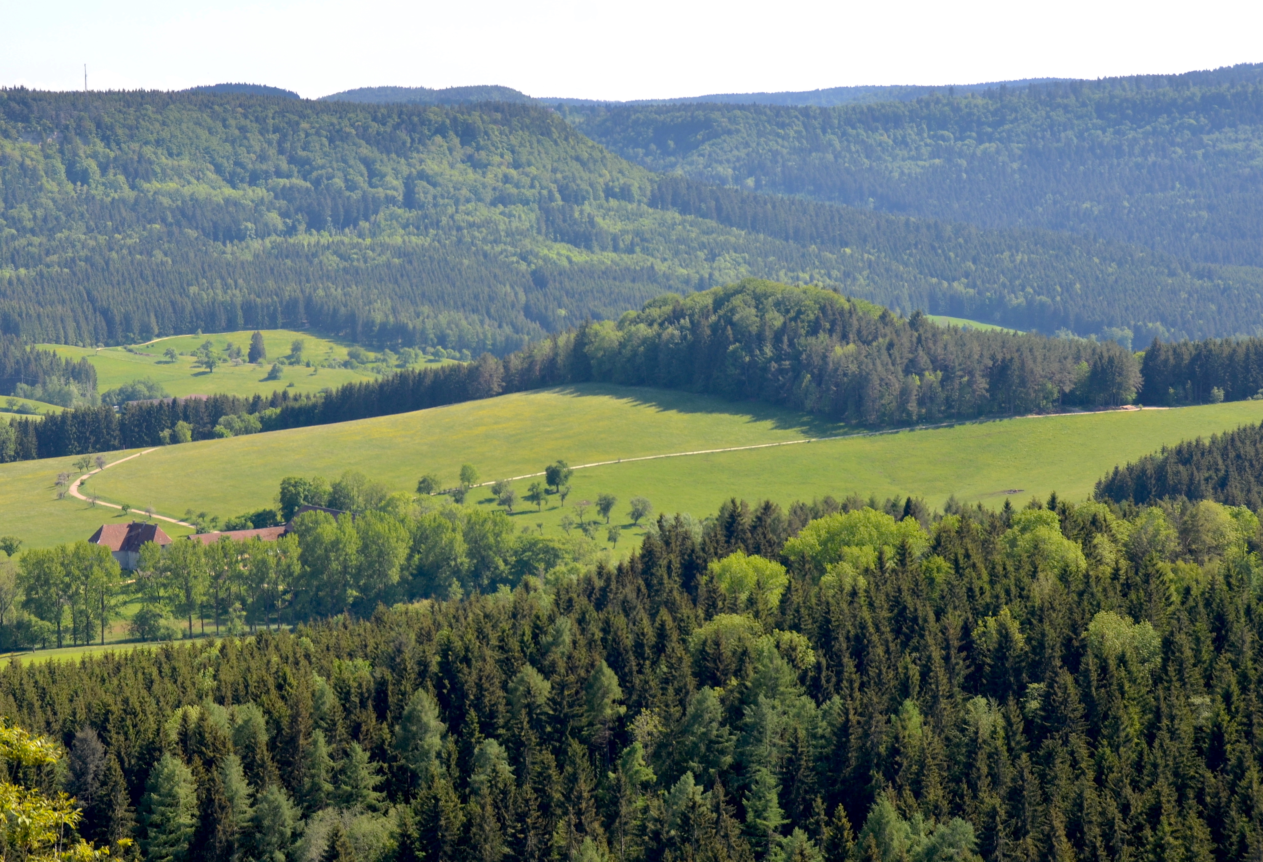 Burzel (Burg Hausen) und Gehöft Oberhausen bei Hausen am Tann